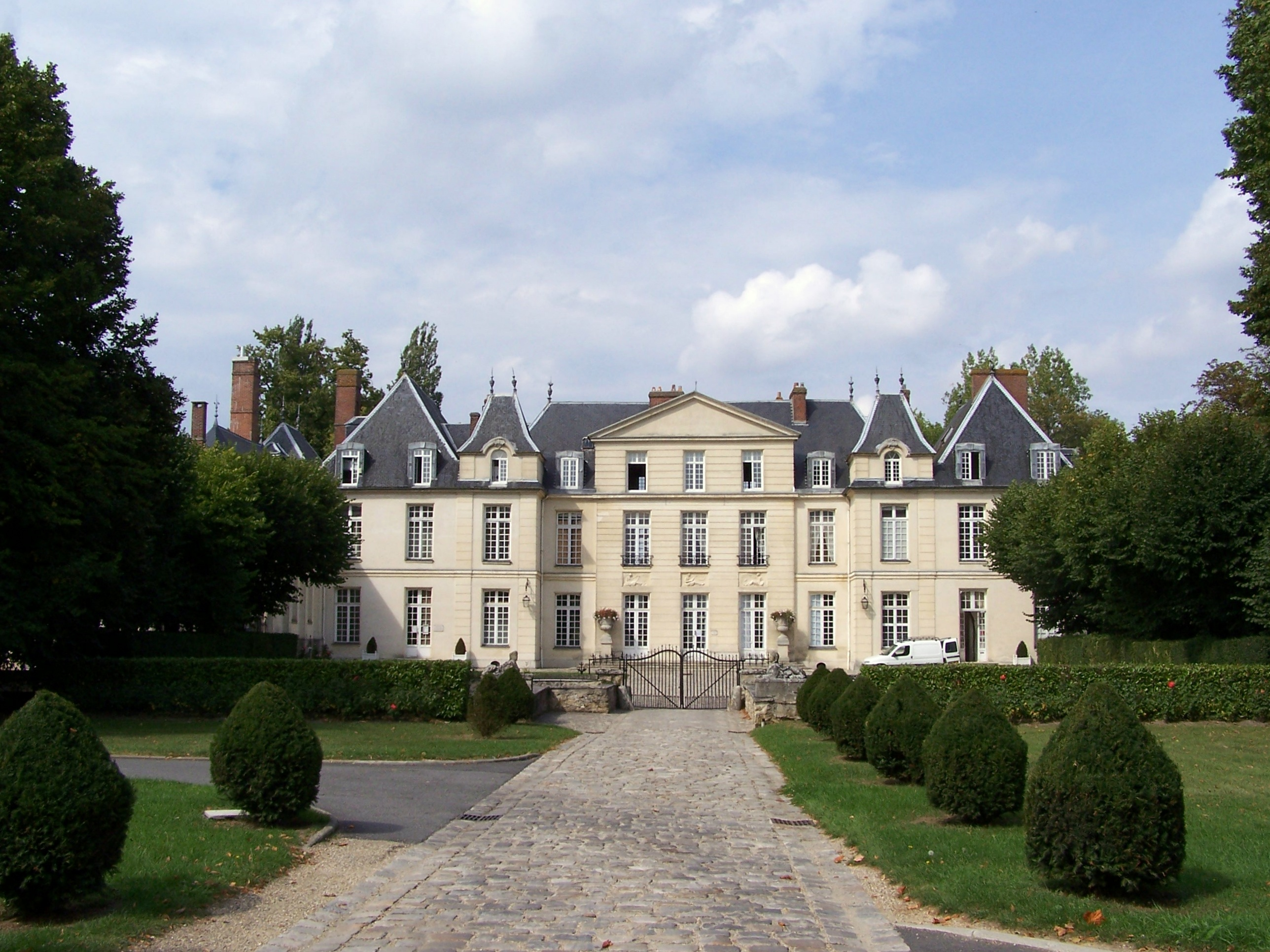 Mairie-château du Mesnil-Saint-Denis (Yvelines, France)